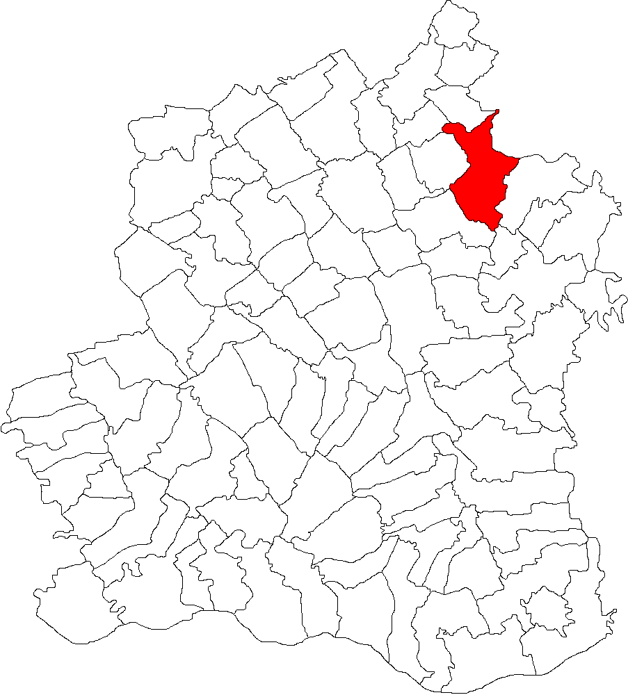 Categorie:Hărţi ale judeţului Teleorman